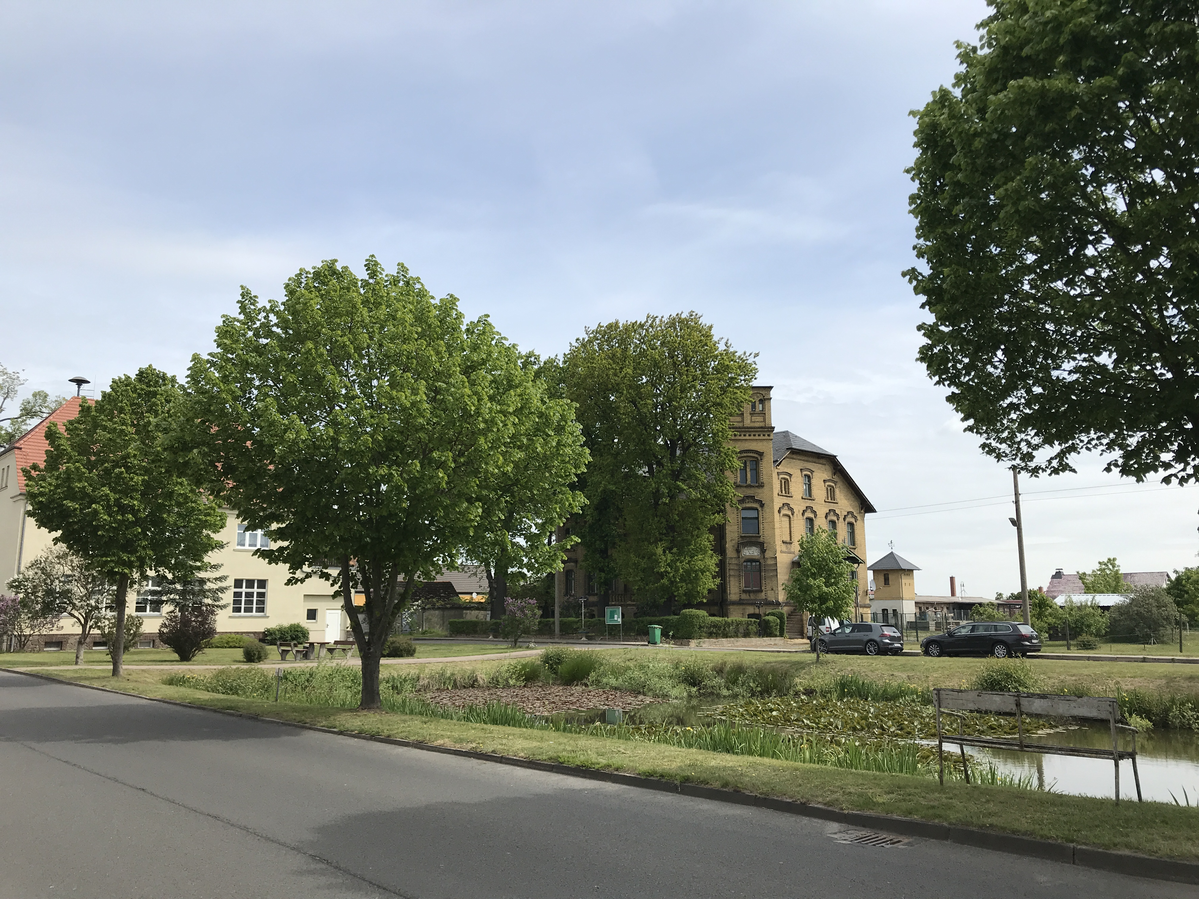 Zellendorf ist ein Ortsteil der Gemeinde Niedergörsdorf im Landkreis Teltow-Fläming im Land Brandenburg